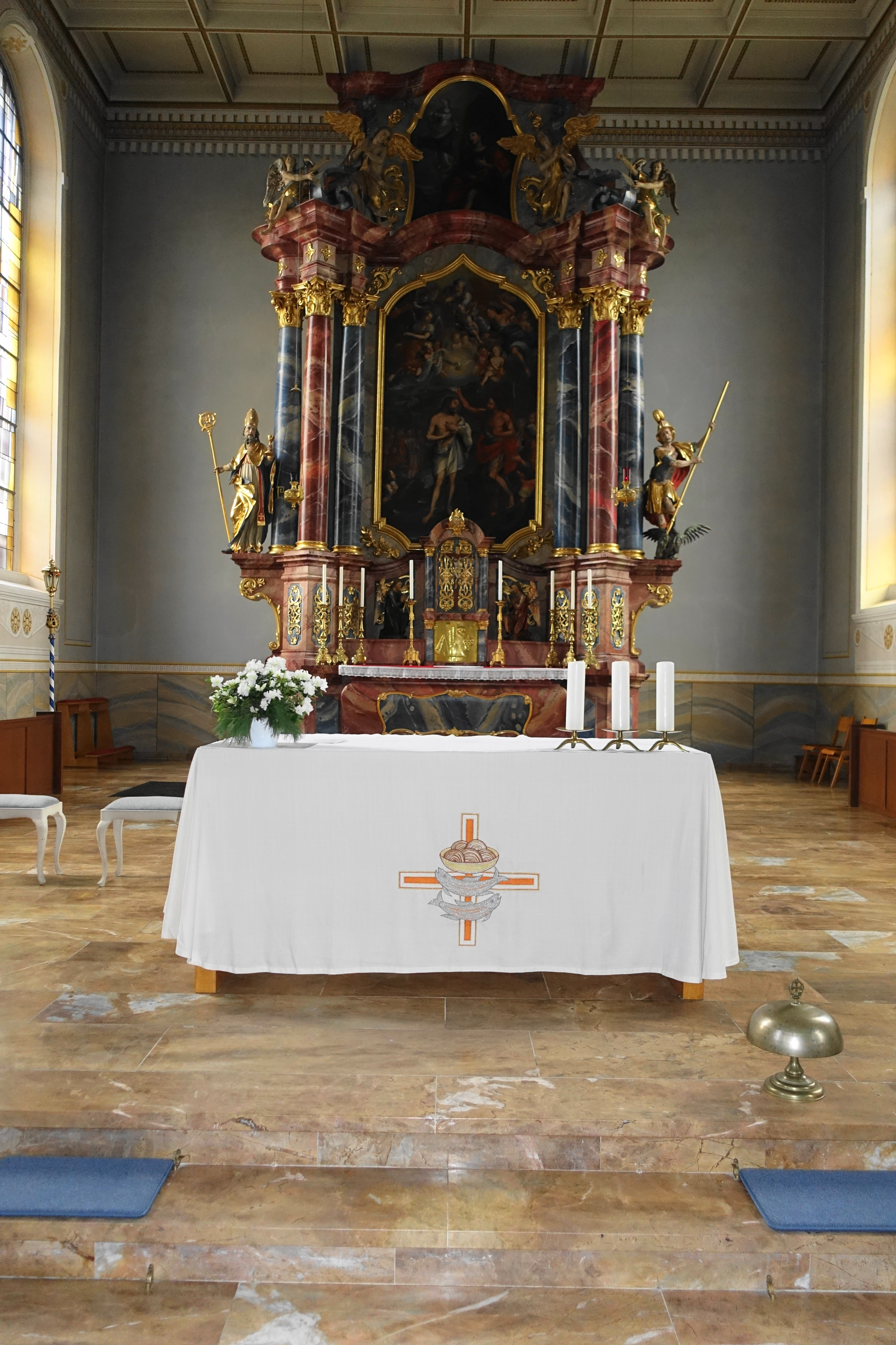 Murg St. Magnus Kirchstraße 9